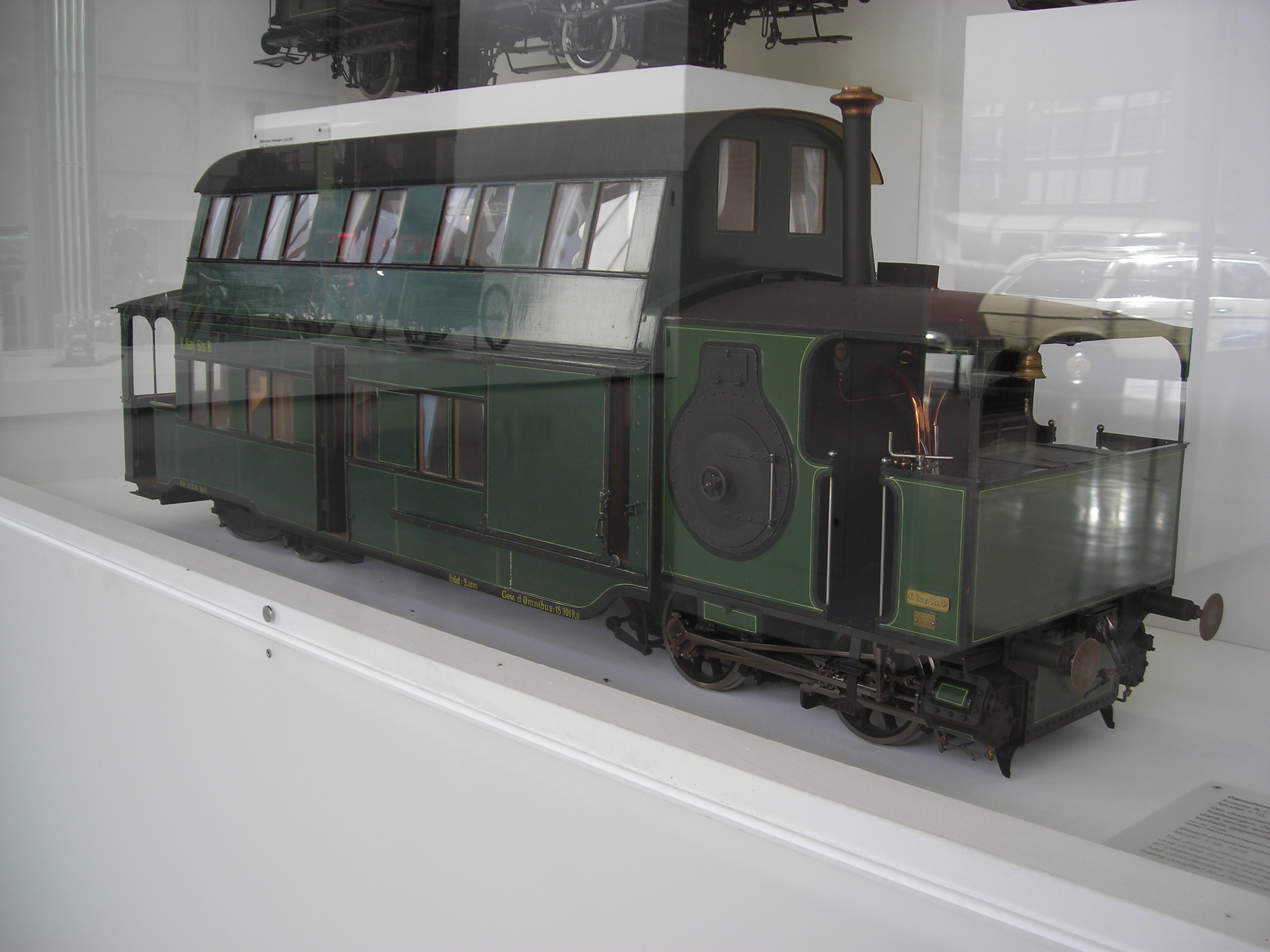 Doppelstöckiger Dampfomnibus für den Schienenverkehr, ein Triebwagen für 67 Fahrgäste, gebaut von Krauss & Co München im Jahr 1882; hier ein Modell im Maßstab 1:10 aus dem Jahr 1910. Exponat im Deutschen Museum Verkehrszentrum, Halle I (Inv.-Nr. 27345)